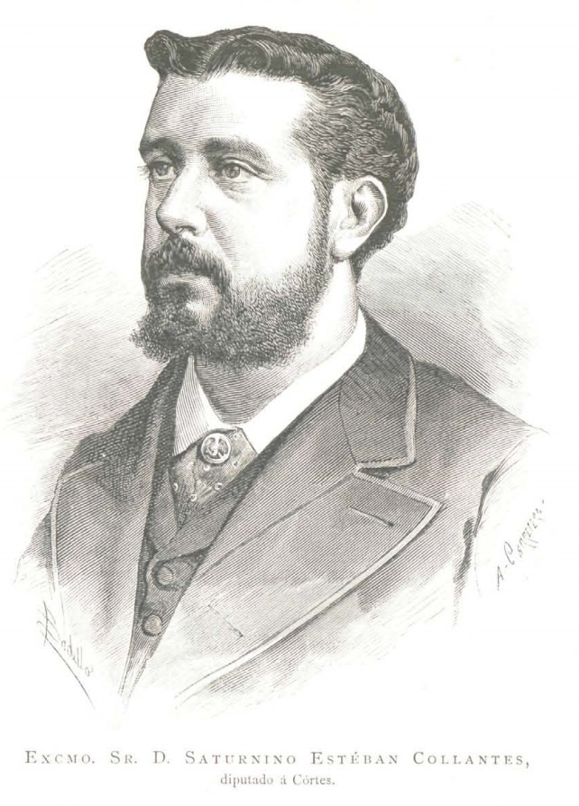 Excmo. Sr. D. Saturnino Esteban Collantes, diputado á Cortes.